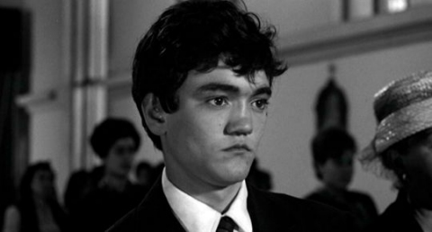 Screenshot from Mamma Roma directed by Pier Paolo Pasolini